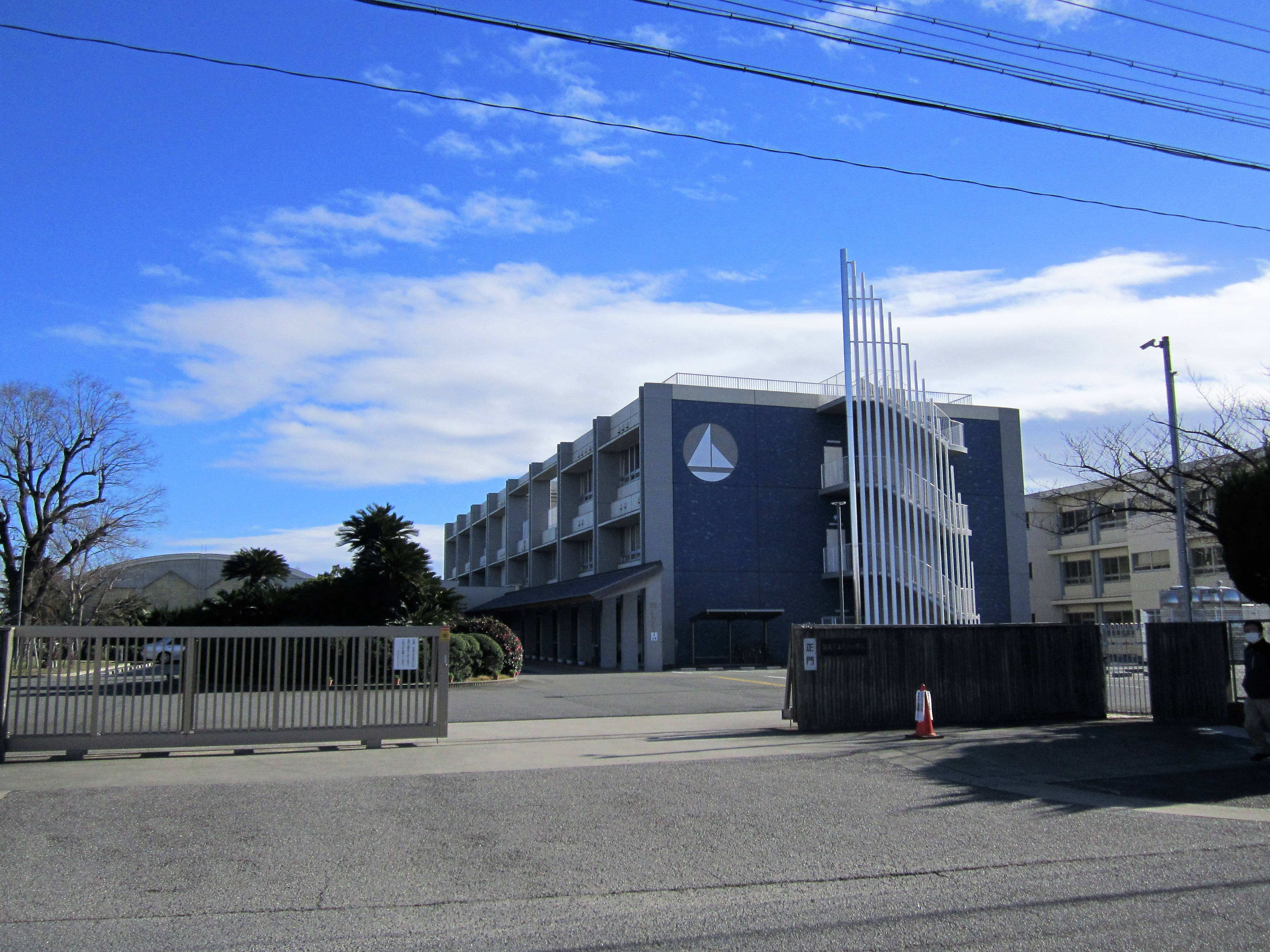 碧南市立大浜小学校 Canon PowerShot A2200